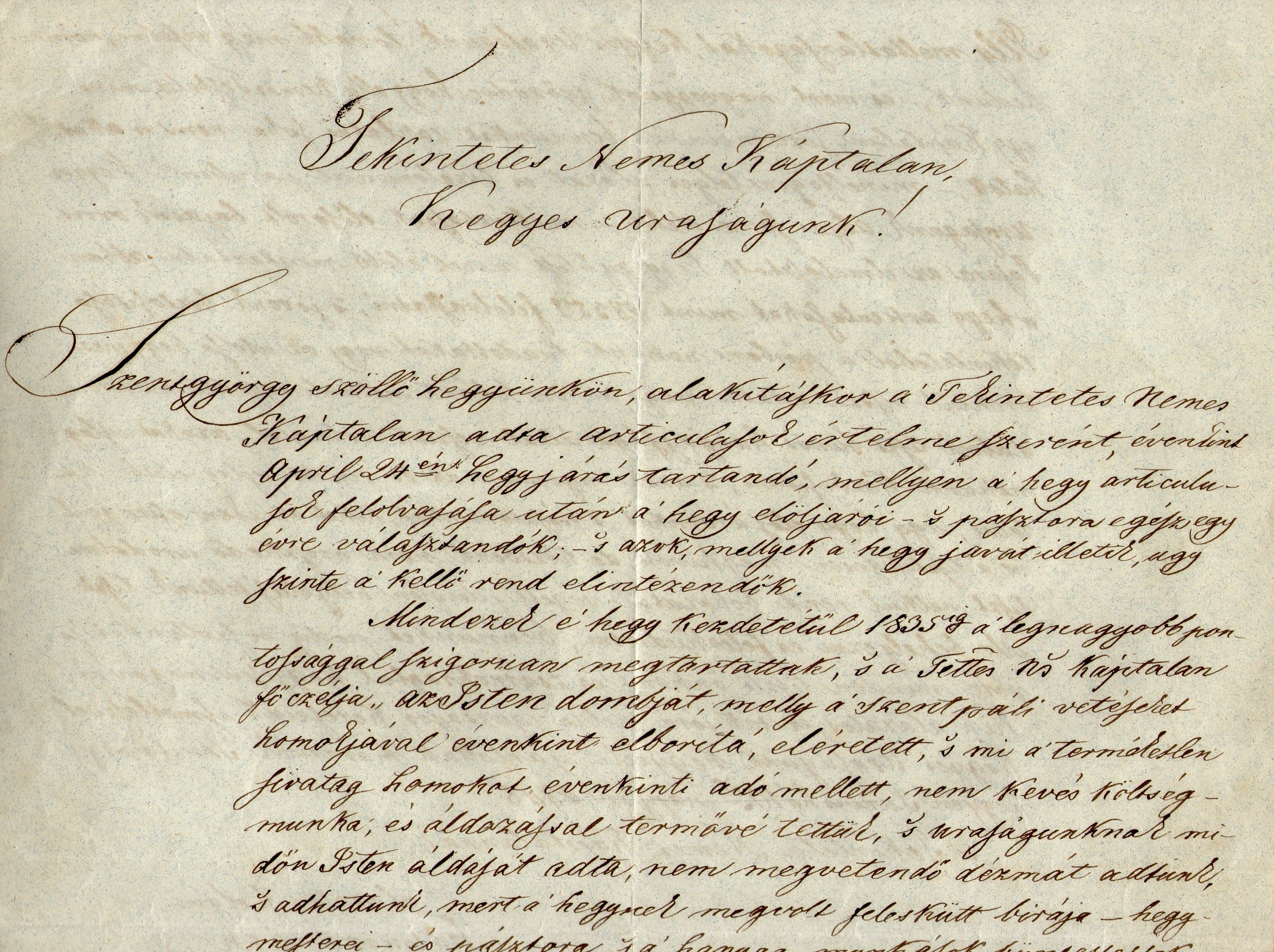 A tulajdonomban lévő dokumentumról saját magam által készített másolat.